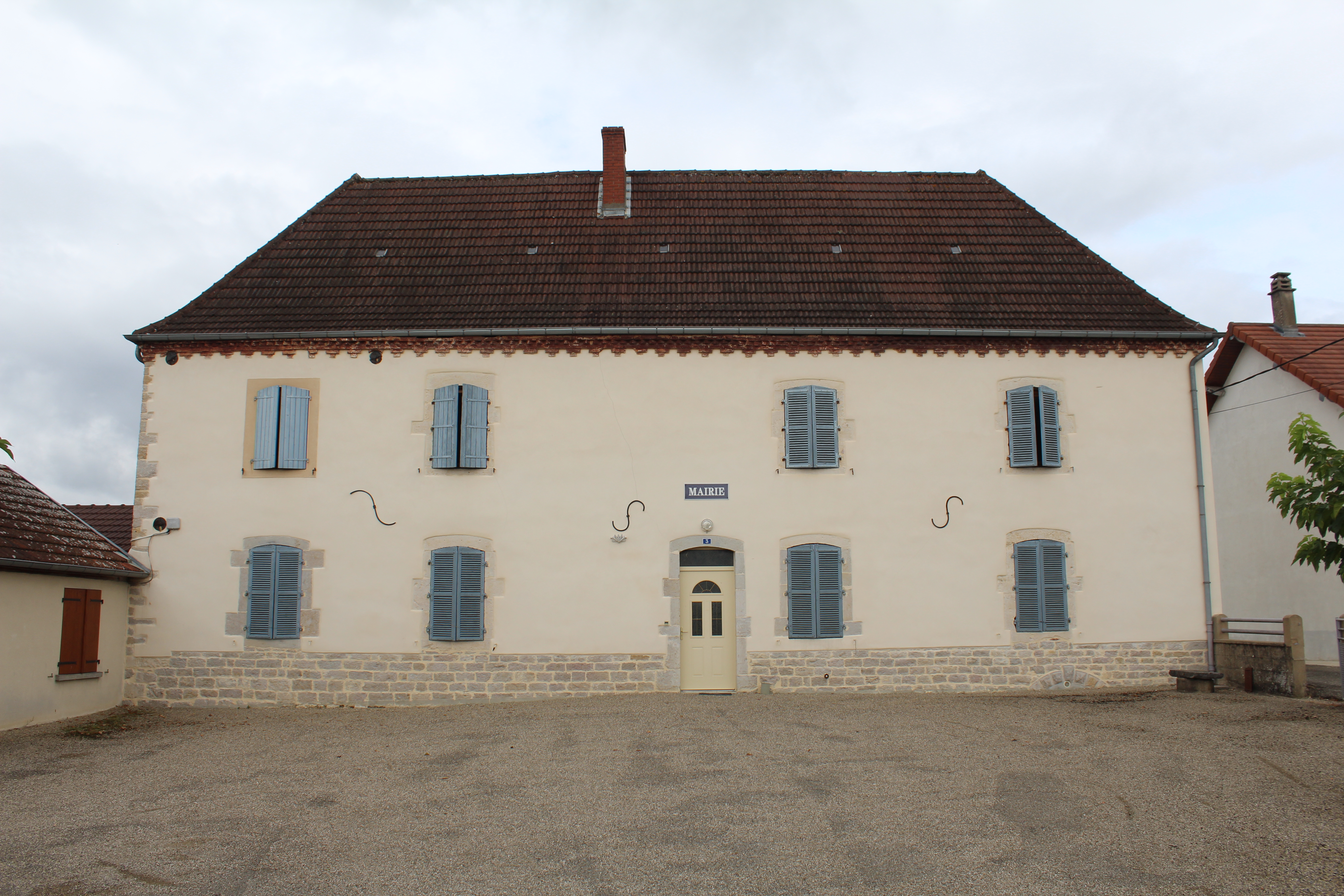 Mairie de La Chassagne.